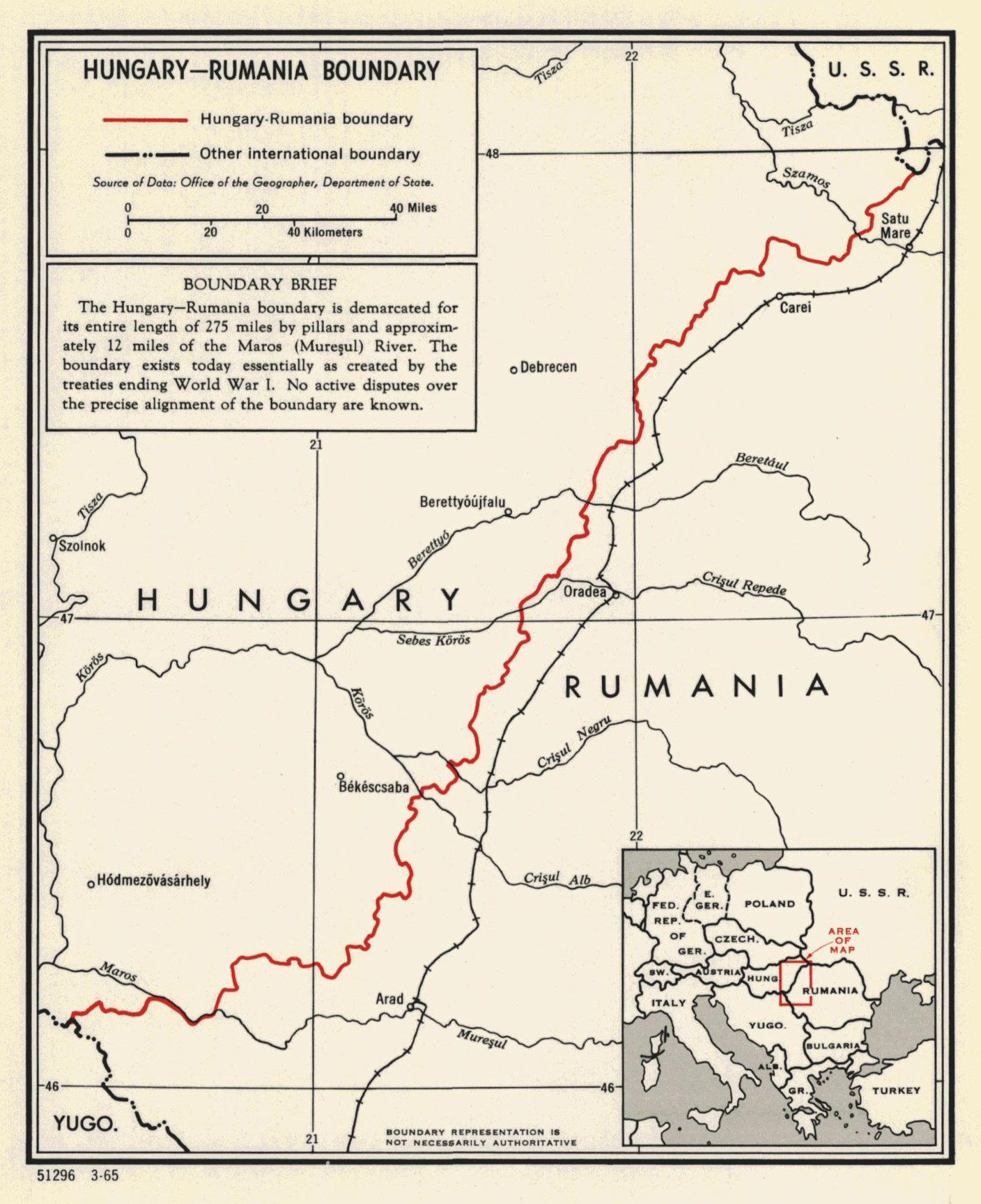 Hungary-Romania Boundary